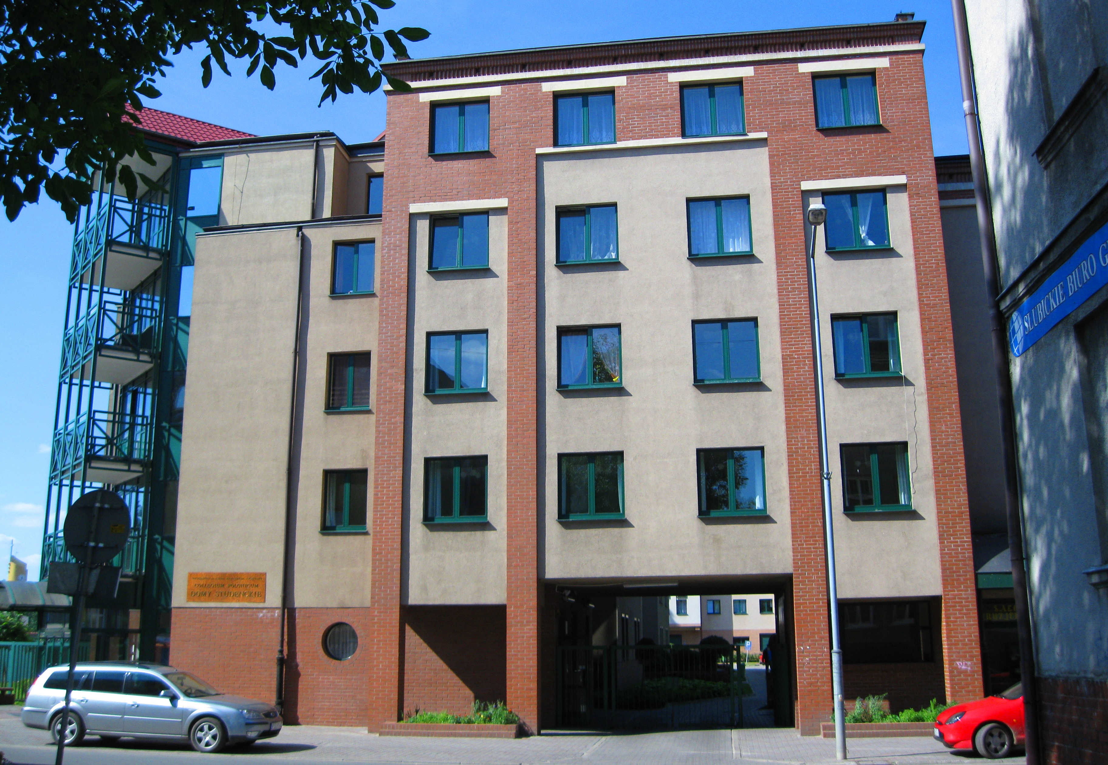 Dom Studencki Arcadia przy ul. Piłsudskiego 13 w Słubicach - widok od południa.